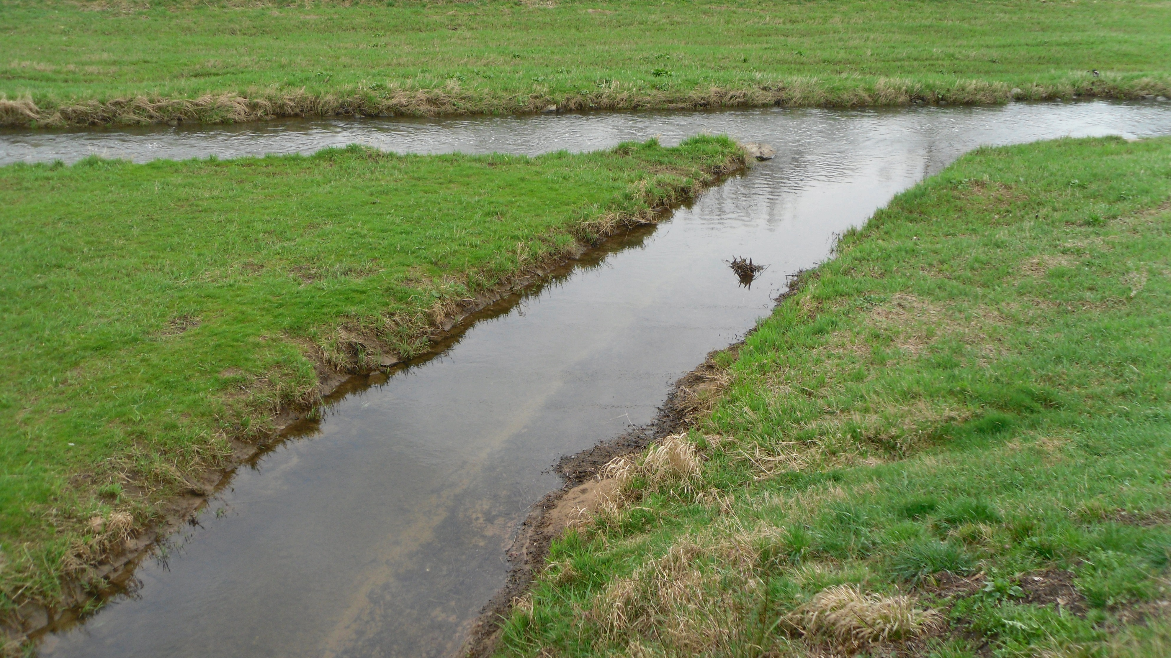 Die Mündung der Dobrach in Kulmbach in die Flutmulde, einem Nebenarm des Weißen Mains. Die Dobrach ist ein gut 8,5 km langer, rechter bzw. nördlicher Zufluss des Weißen Mains.